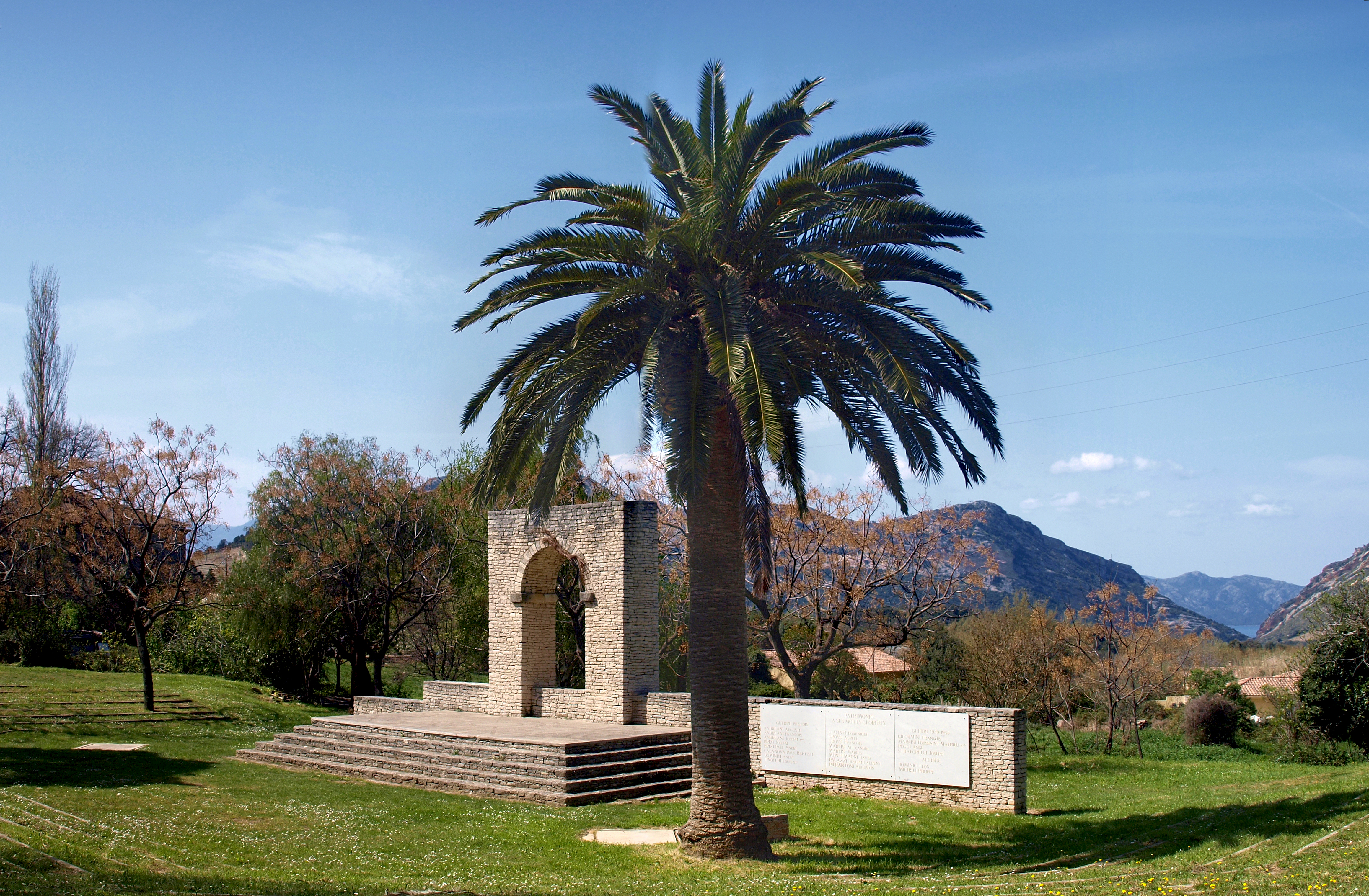 Patrimonio (Corsica) - Monument aux morts